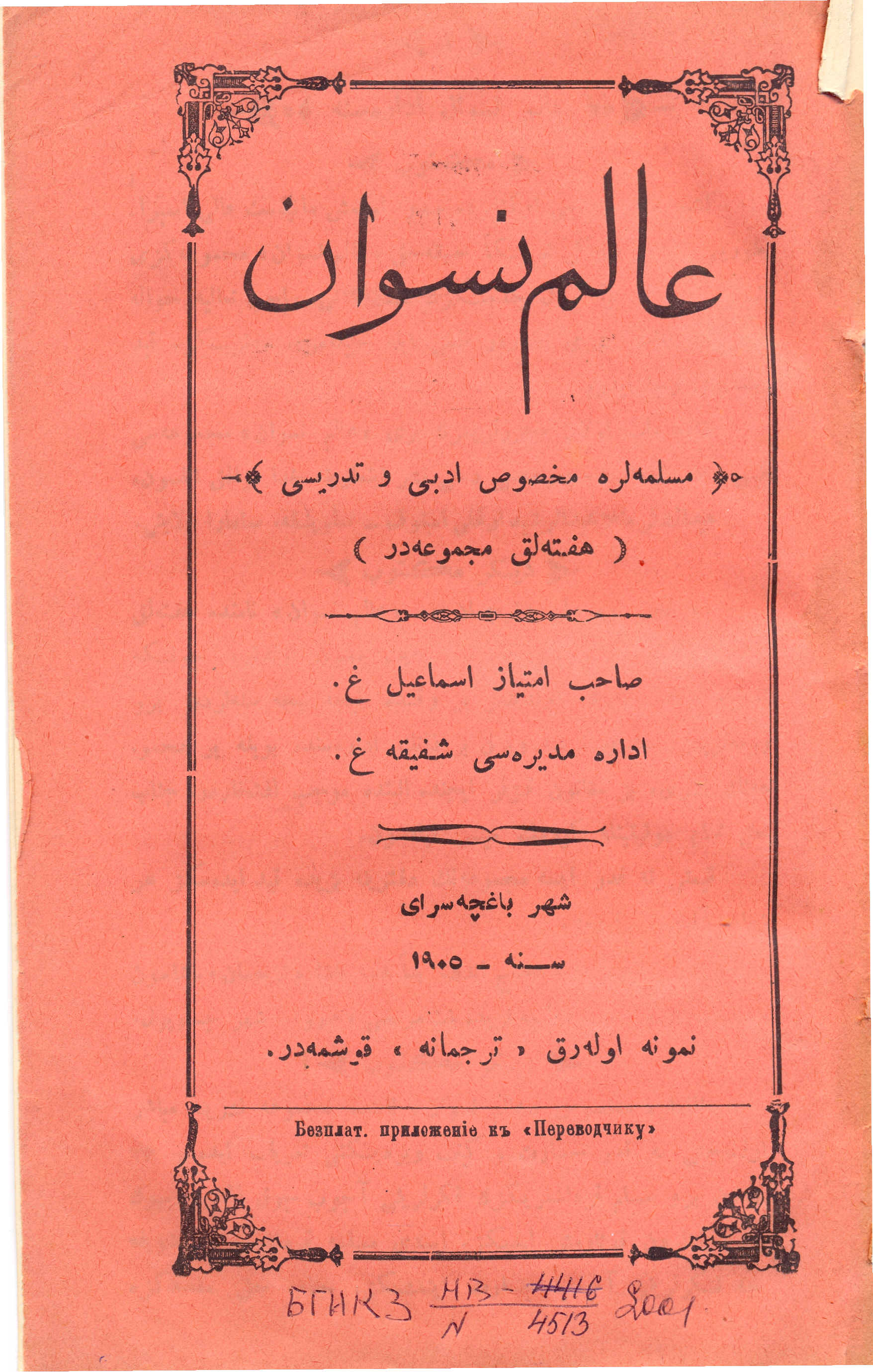 Обложка журнала «Алем-и нисван» (1906—1912)